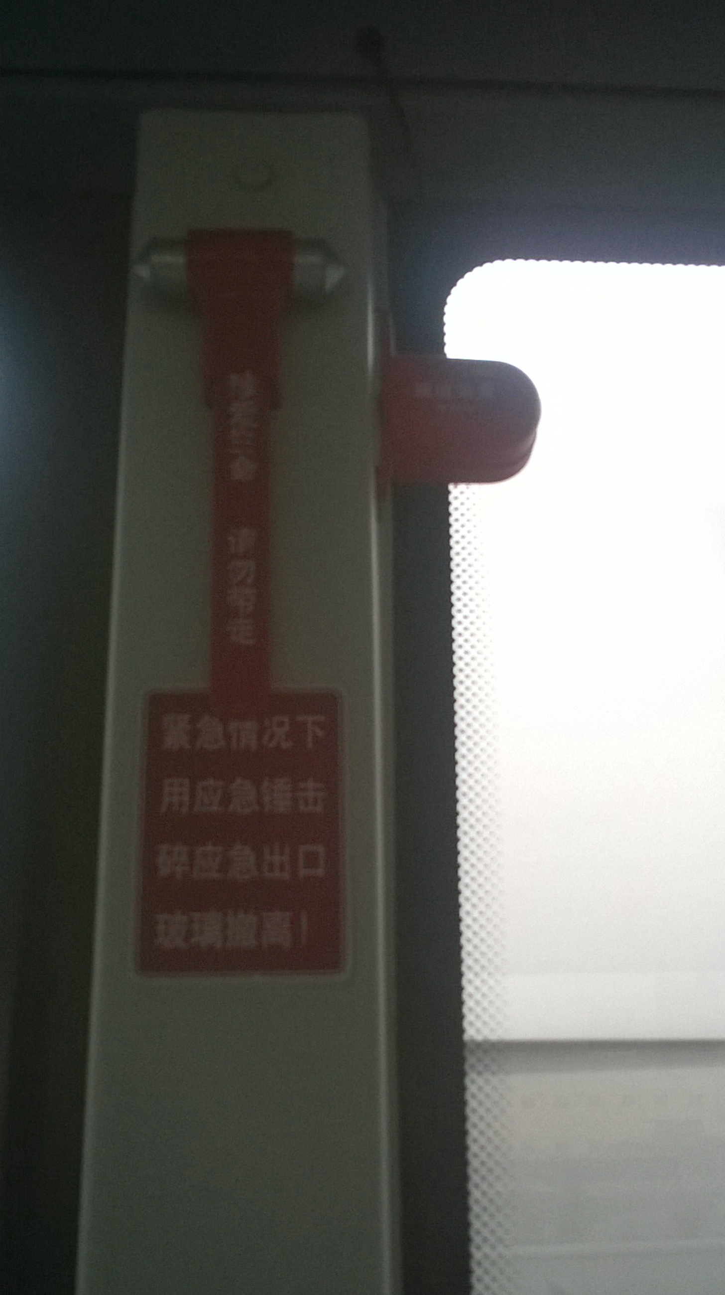 成都市二环路快速公交应急锤和破玻装置